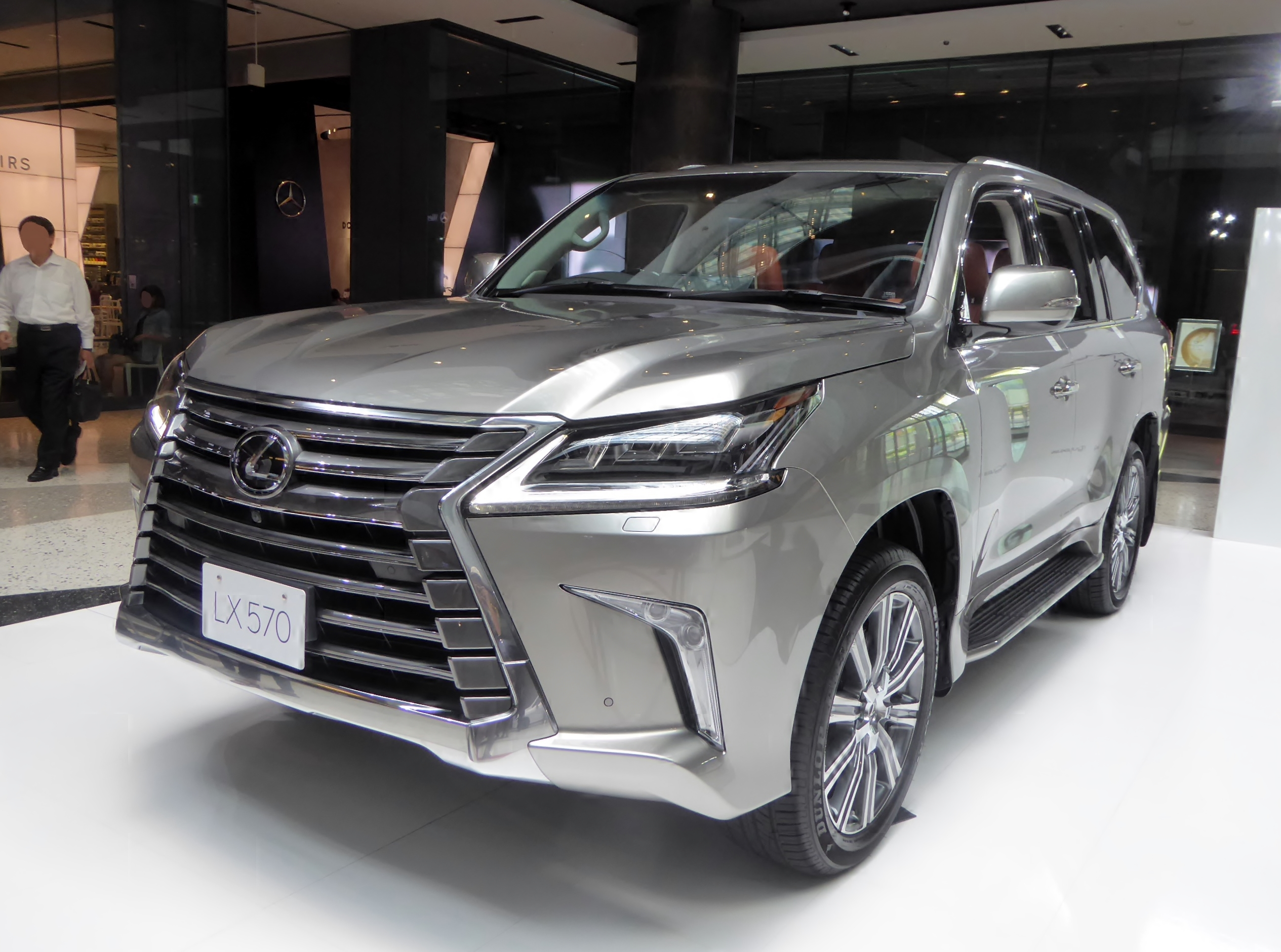 DBA-URJ201W-GNZGK型レクサス・LX570をフロントから撮影。